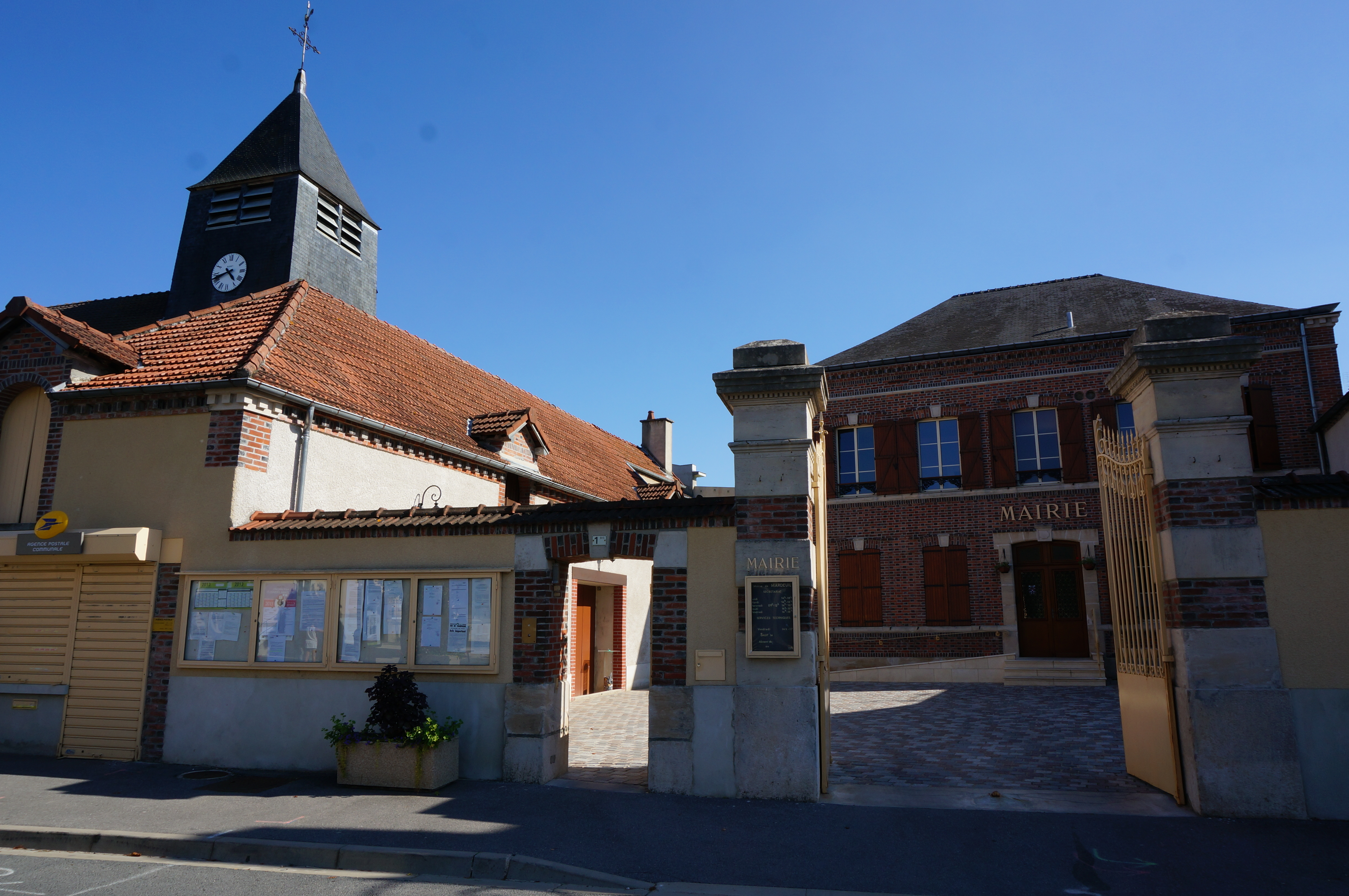 La Mairie la Poste et l'église du village.